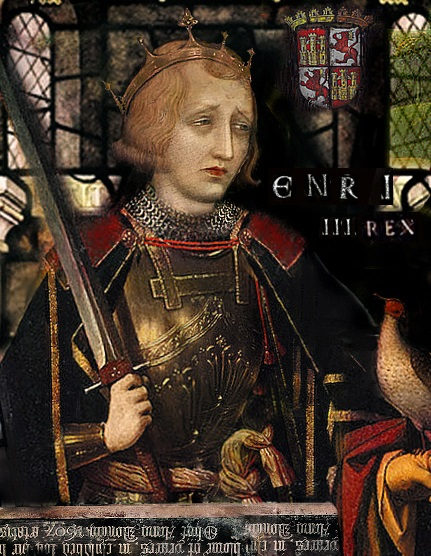 Enrique III de Castilla Henry III of Castile